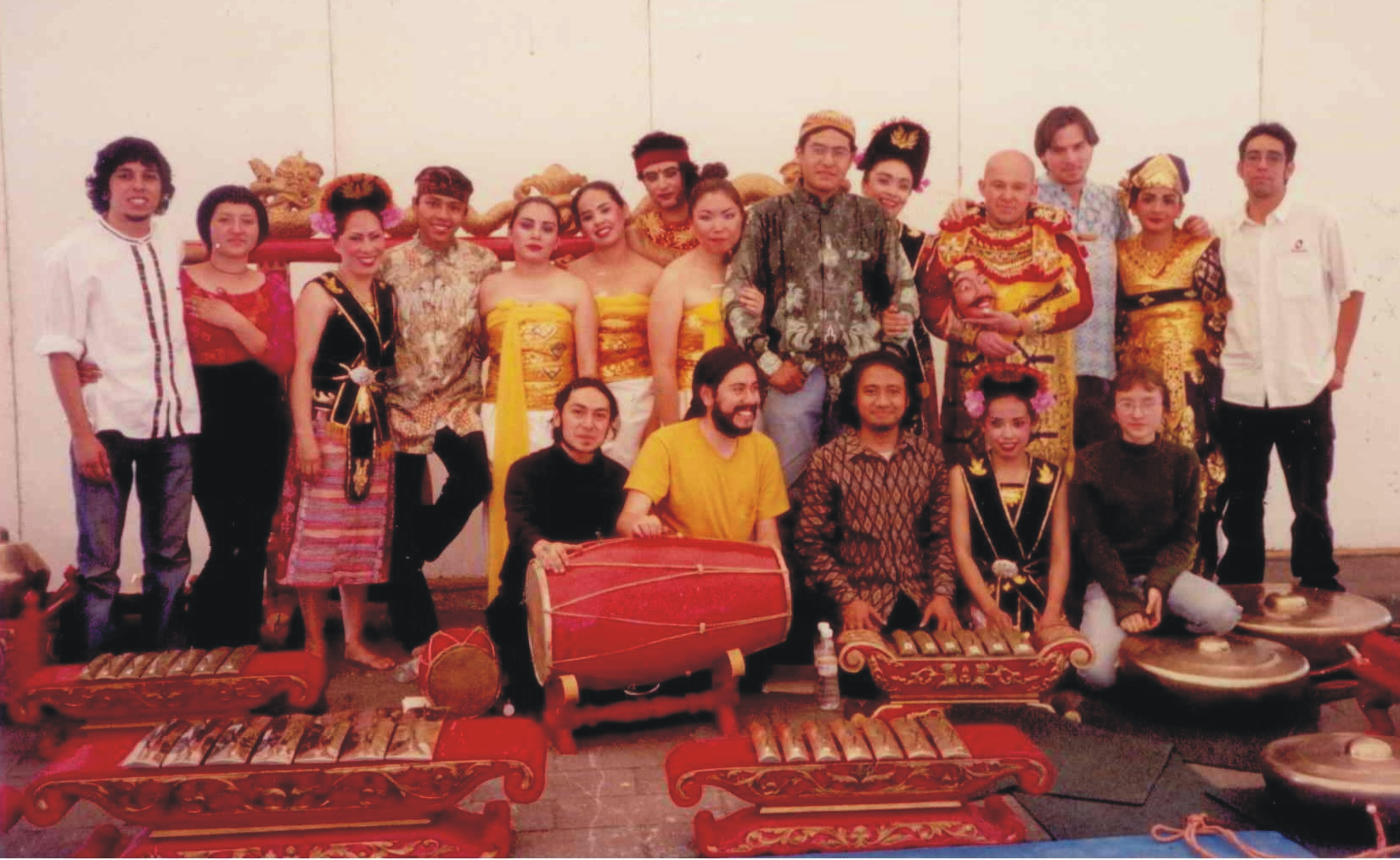 grupo gamelan Indra Swara 2003 uno de los primeras tocadas del grupo fundado en el diciembre de 2002